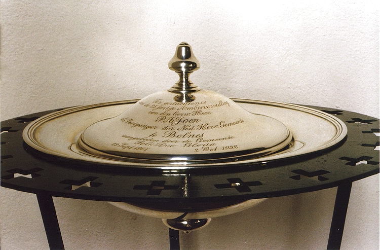 doopvont